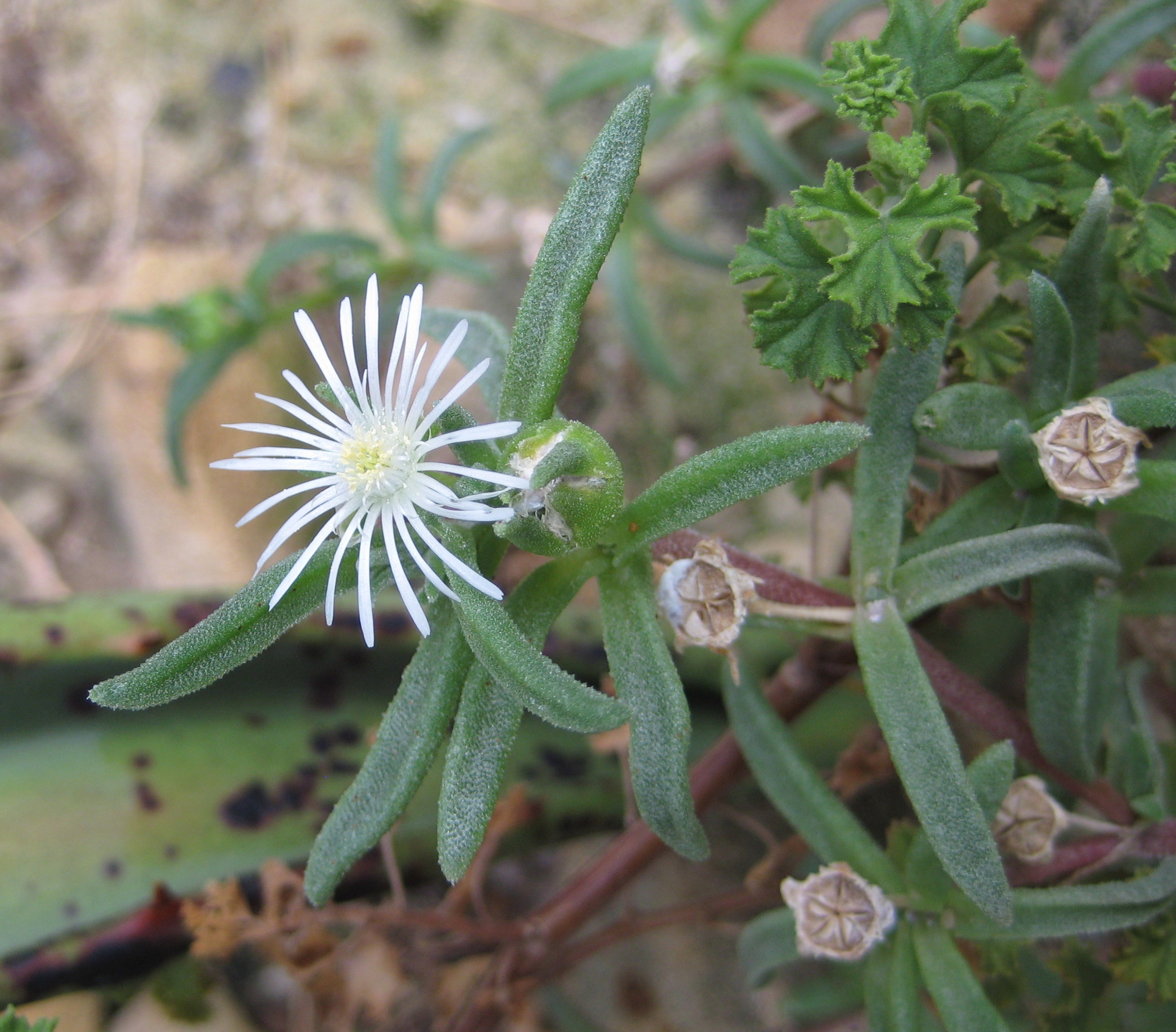 Delosperma steytlerae im Botanischen Garten Dresden